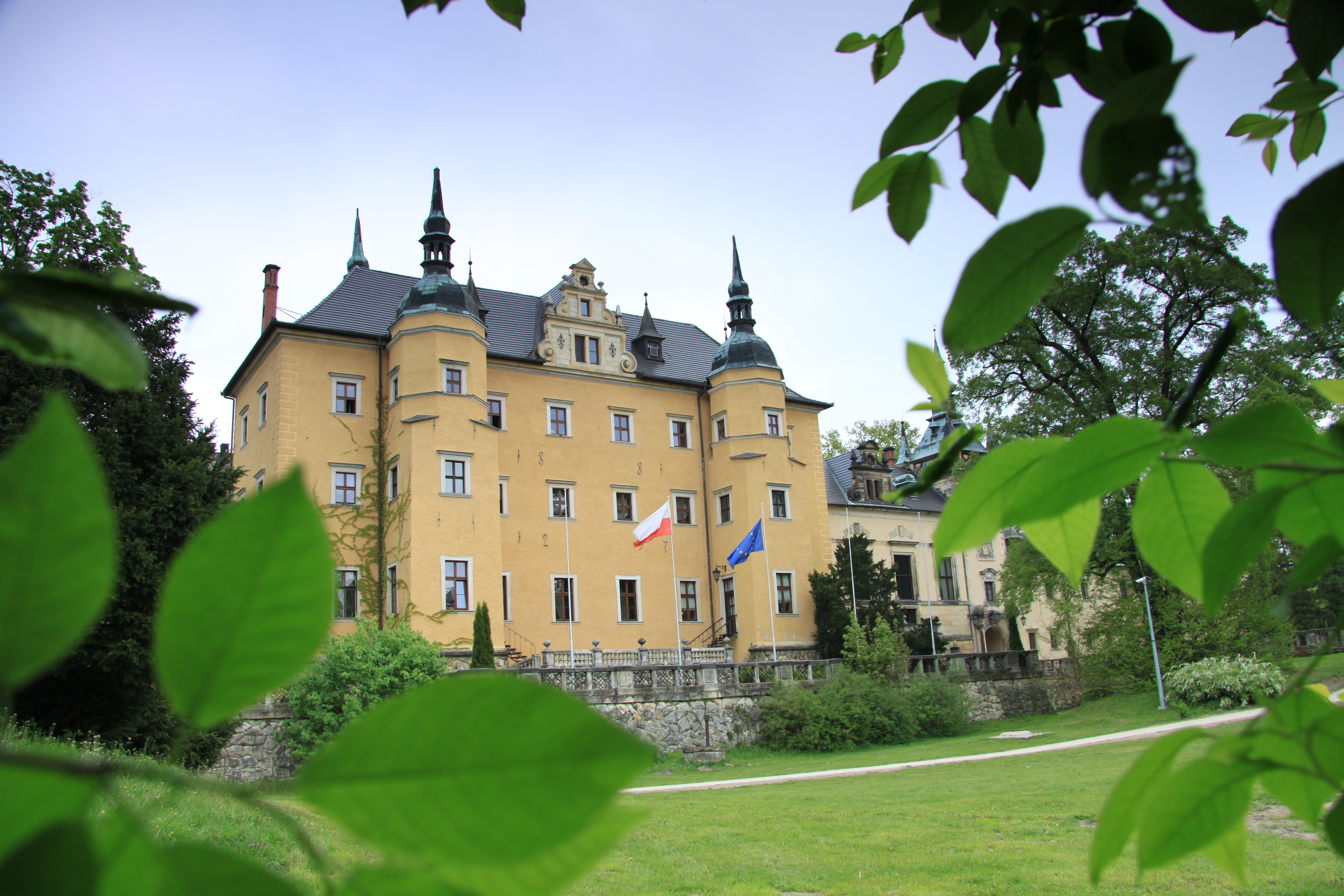 Kliczków 8 - zamek